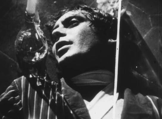 screenshot film Licensing 1968